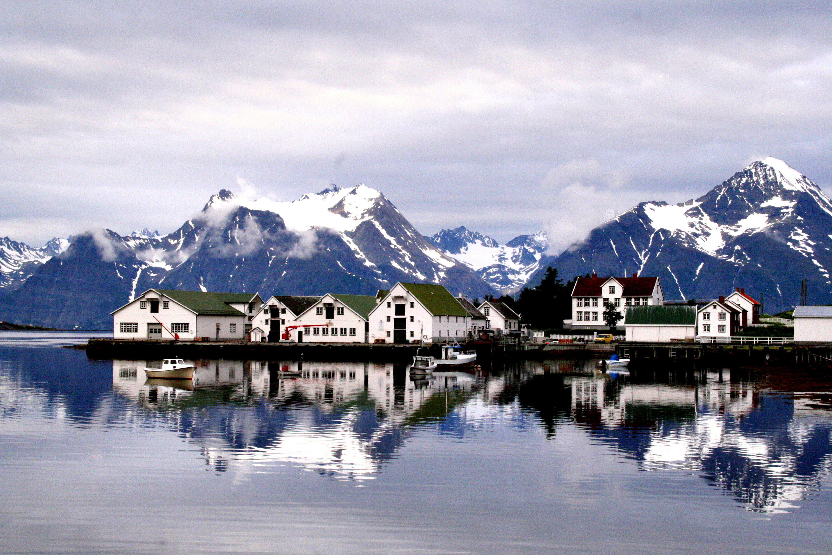 Havnnes Handelssted - Norges nordligste bevarte handelssted som fortsatt er i drift!